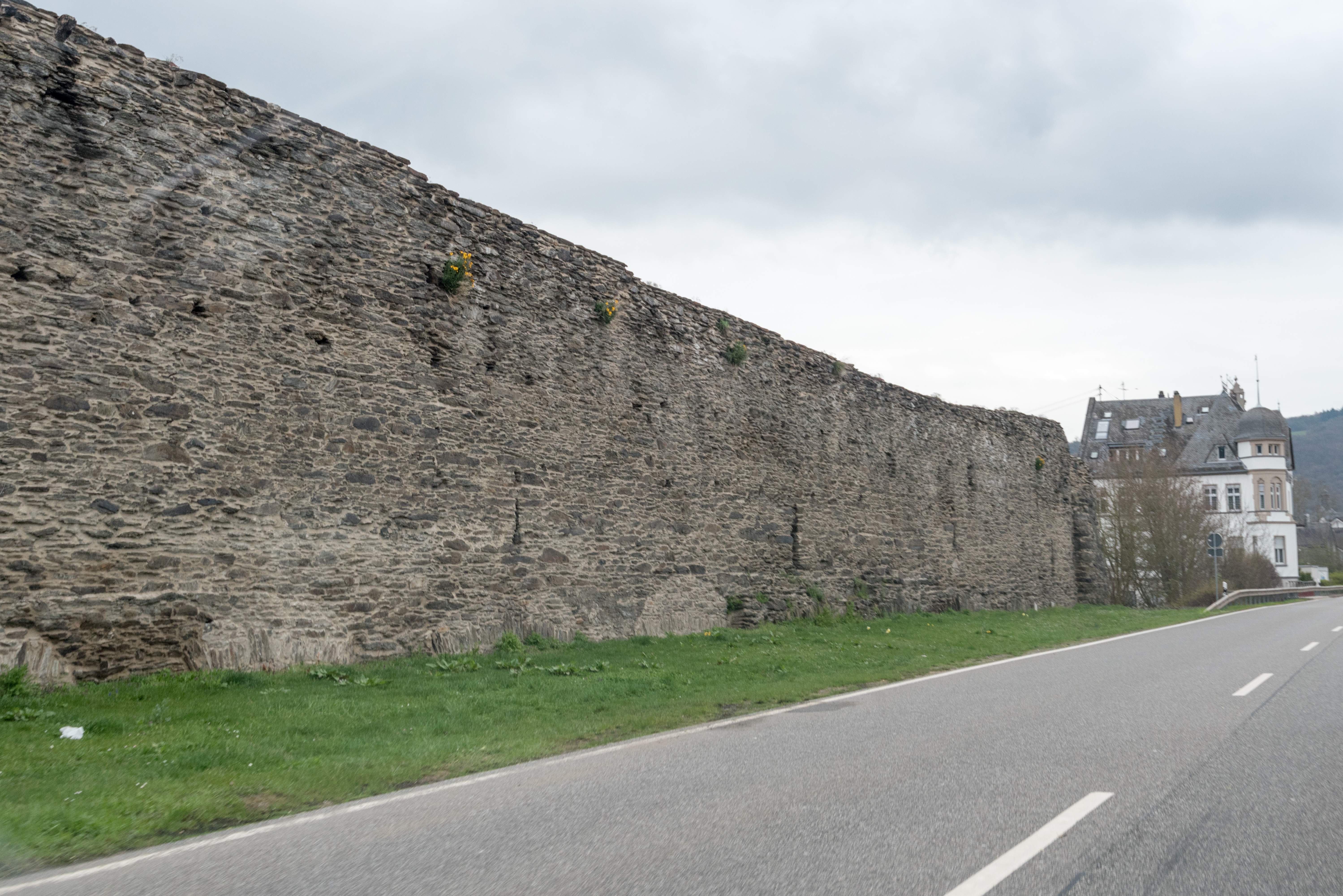 Boppard, Stadtbefestigung, Stadtmauer an der B9